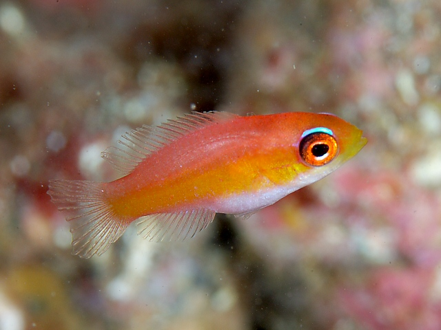 クジャクベラ Paracheilinus carpenteri